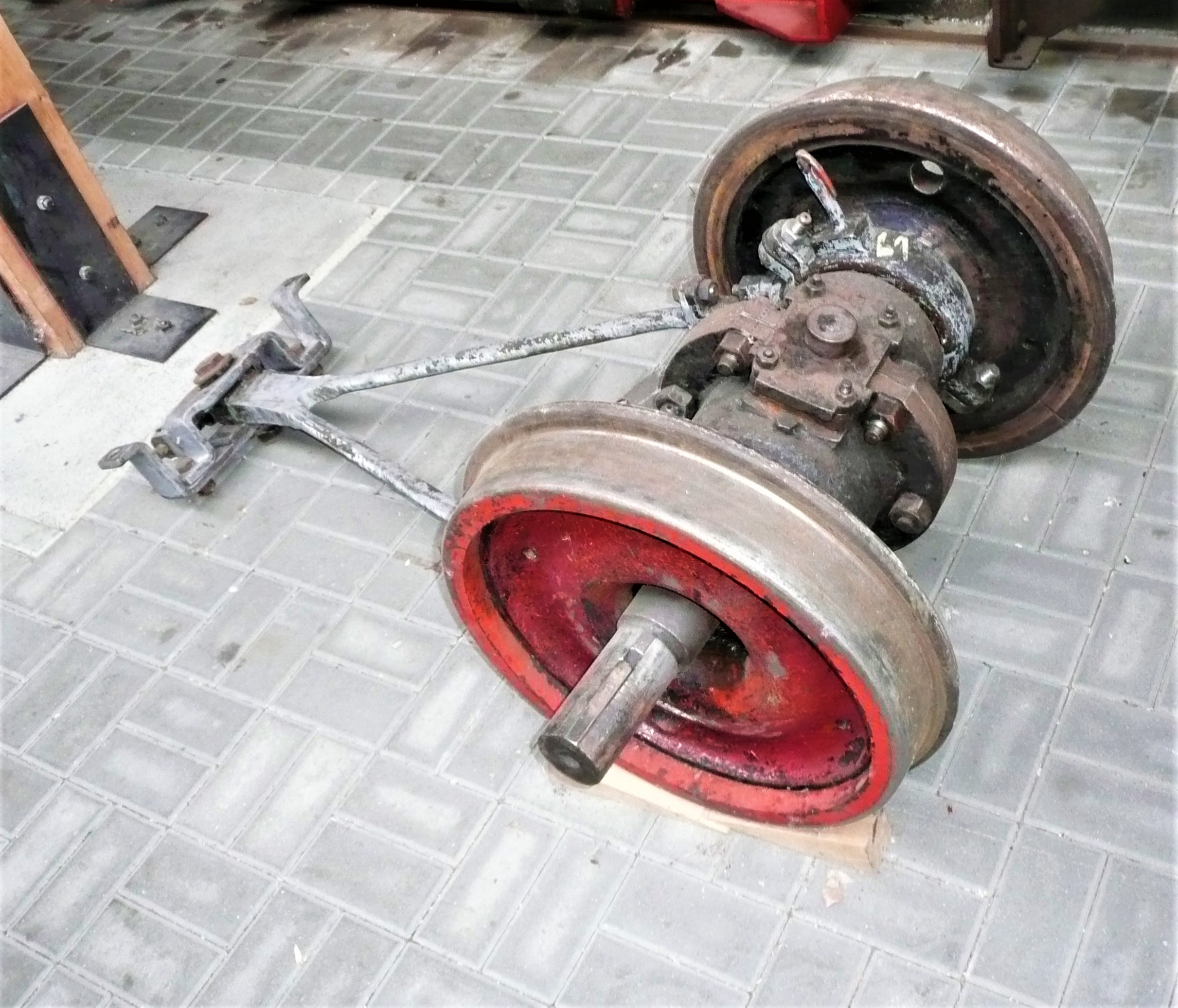 Klien-Lindner-Hohlachse einer Brigadelokomotive der WEM im Lokschuppen von Weisswasser